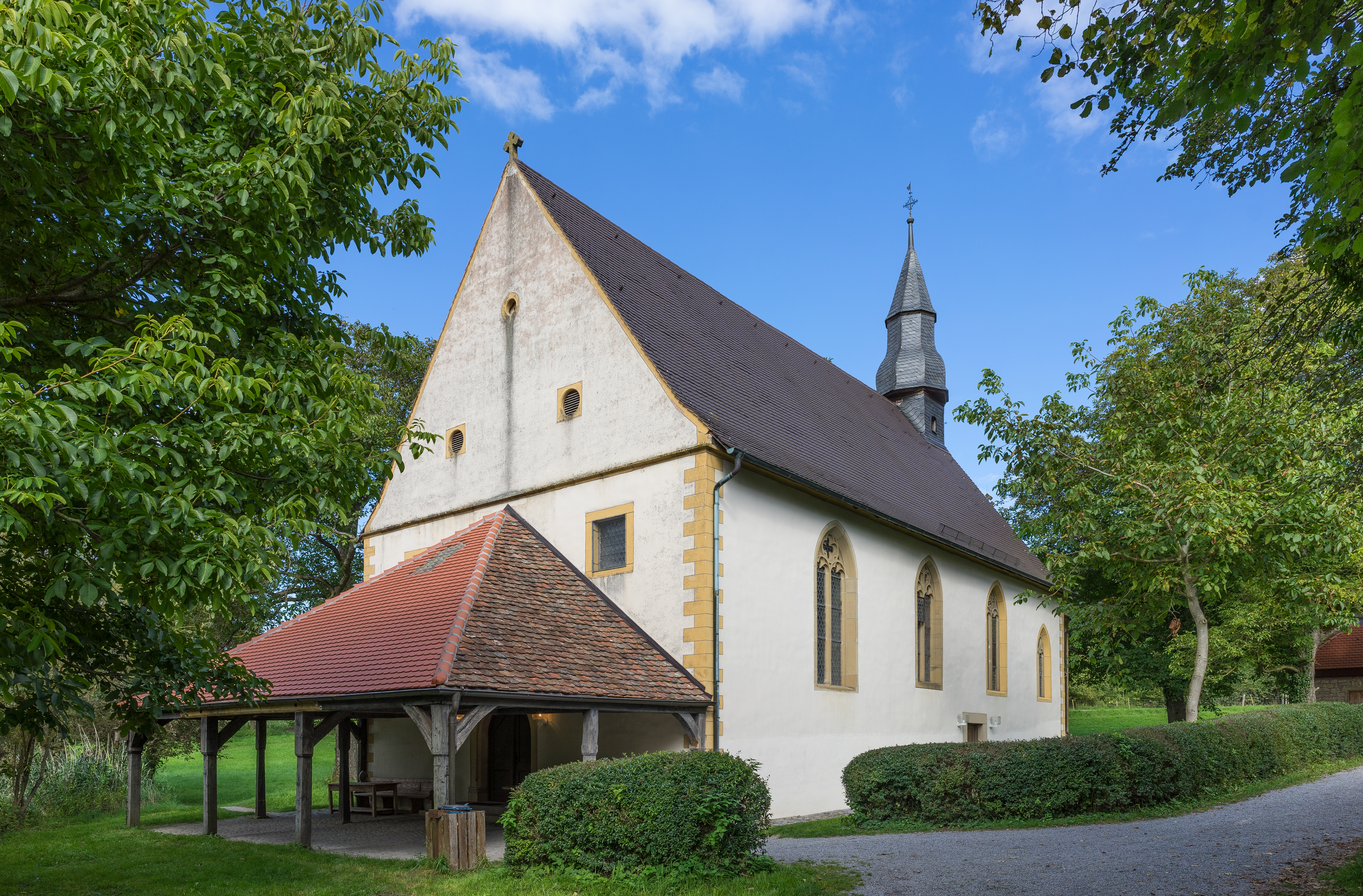 Schöntal (Hohenlohekreis), Wallfahrtskapelle Neusaß: Ansicht der Kapelle von Südwesten. Zu sehen sind auch die Walnussbäume, die die Kapelle umgeben.